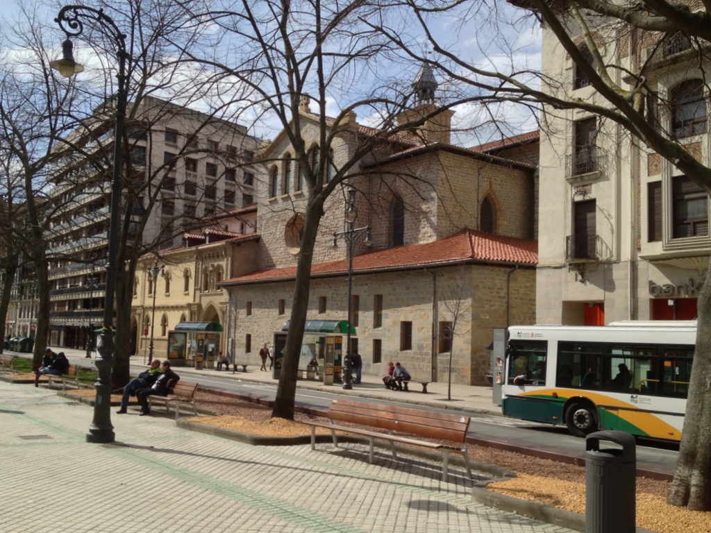 Pamplona